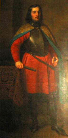 Le Comte Renaud III de Bourgogne